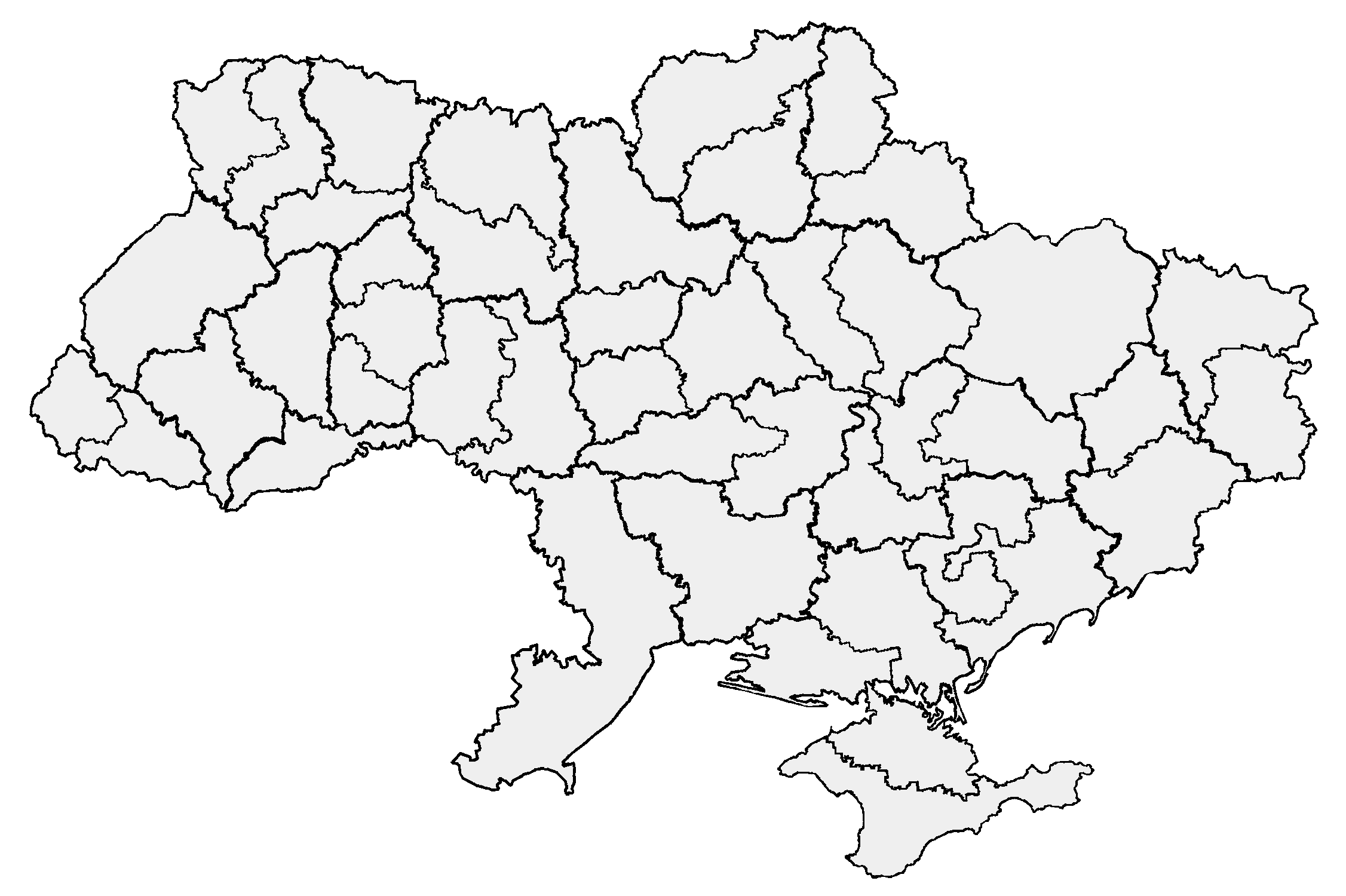 Карта єпархій УПЦ (МП)